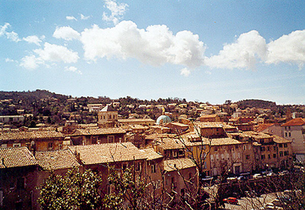 Blick auf Apt (Vaucluse), Frankreich